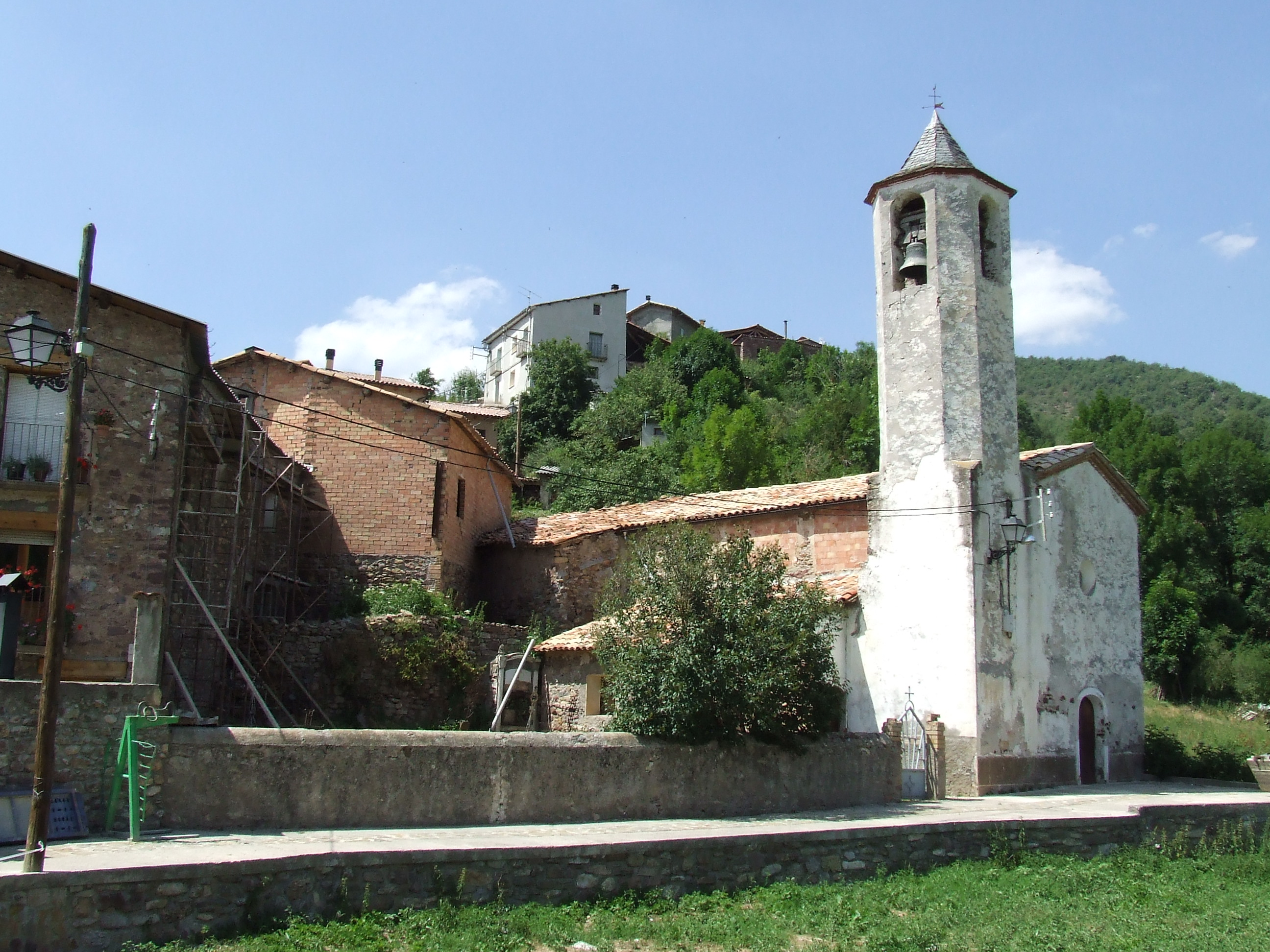 Sant Sebastià de les Esglésies (Sarroca de Bellera, Pallars Jussà)